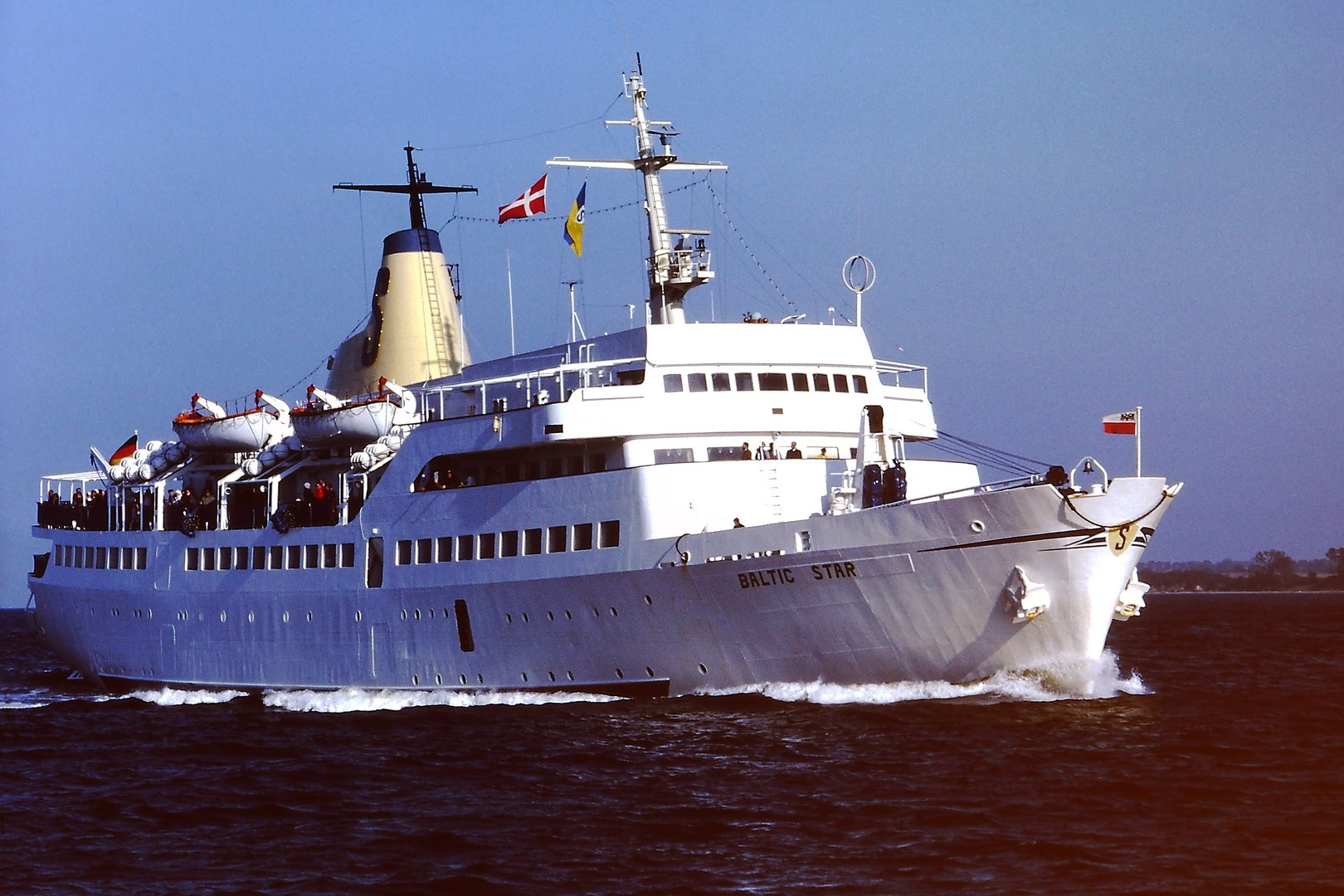 FS Baltic Star im Hafen von Travemünde IMO Number: 5404964 Length: 95 m Beam: 14 m